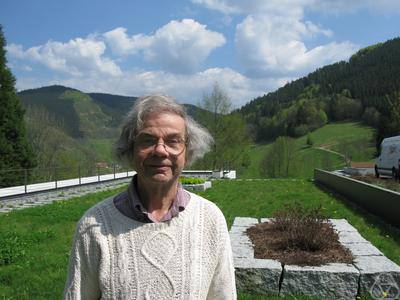 Foto di Paul Monsky